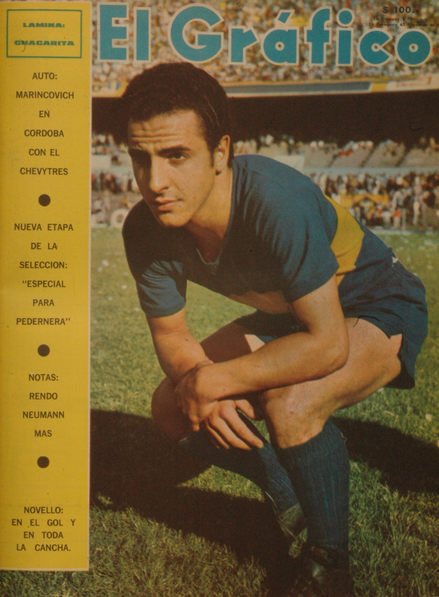 El Grafico del 15 de Julio de 1969. Edicion 2597